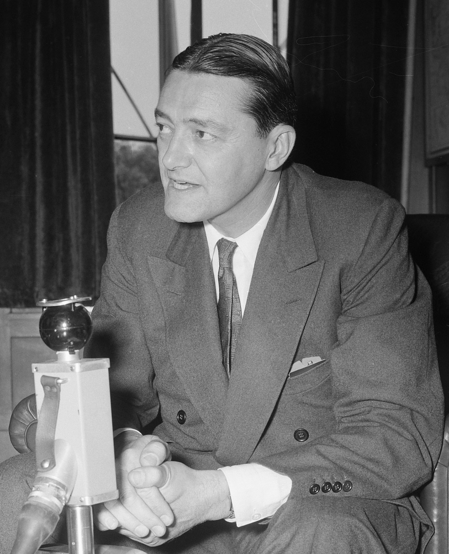 Philip Young nieuwe Amerikaanse ambassadeur